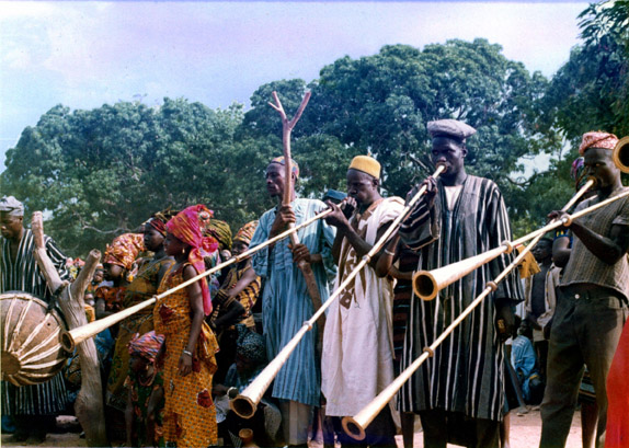 Photo prise à la Gaani 1969 Auteur: JP. Grossenbacher